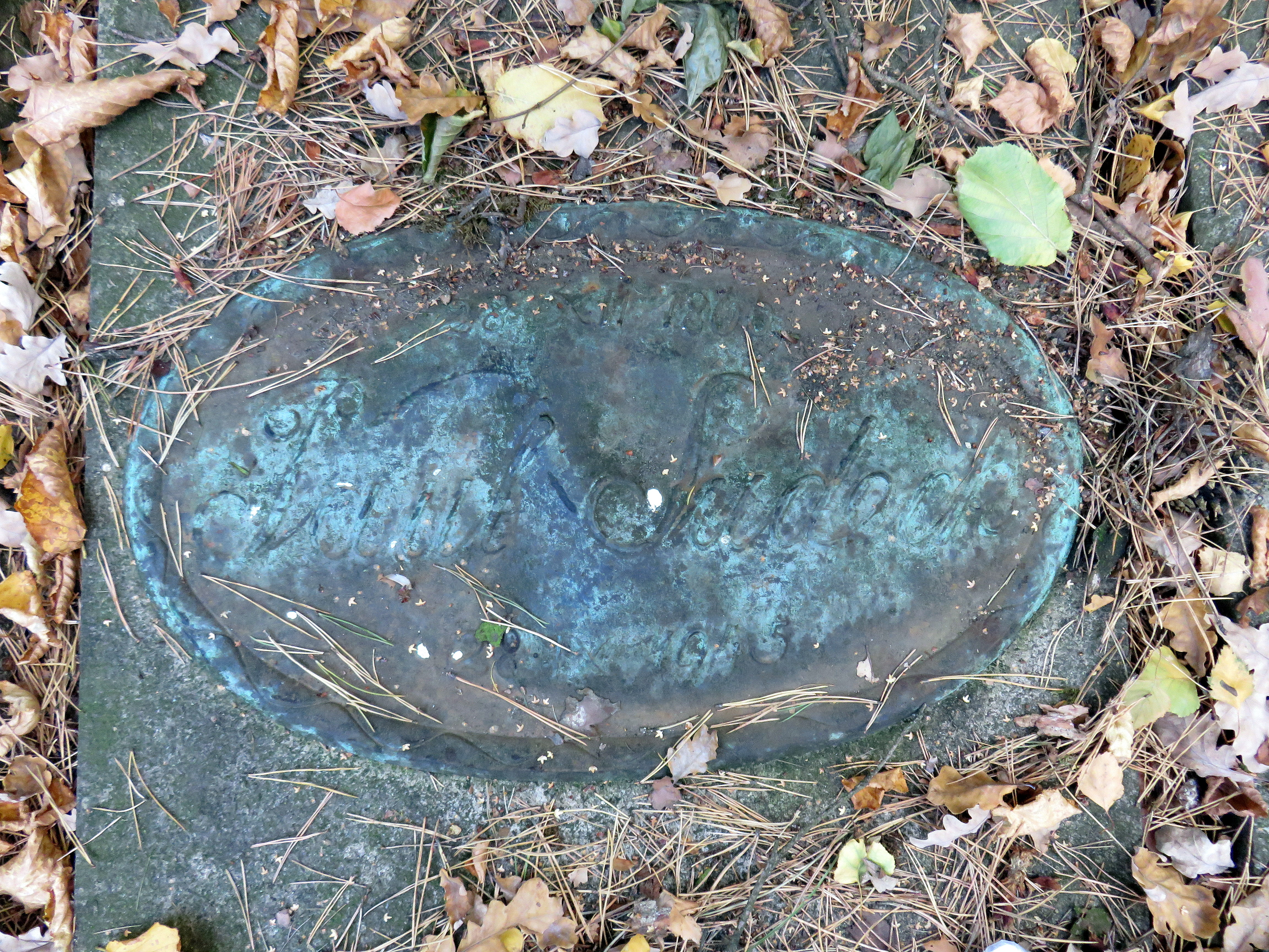 Familiengrab Sudeck/Vogler, mit Kissenstein insbesondere für den deutschen Chirurgen Paul Sudeck, Planquadrat M 24 (etwa gegenüber Wasserturm/Cordesallee), spiegelbildlich gegenüber dem Familiengrab Vogler im Bereich eines düsteren , in sich geschlossenen Areals.